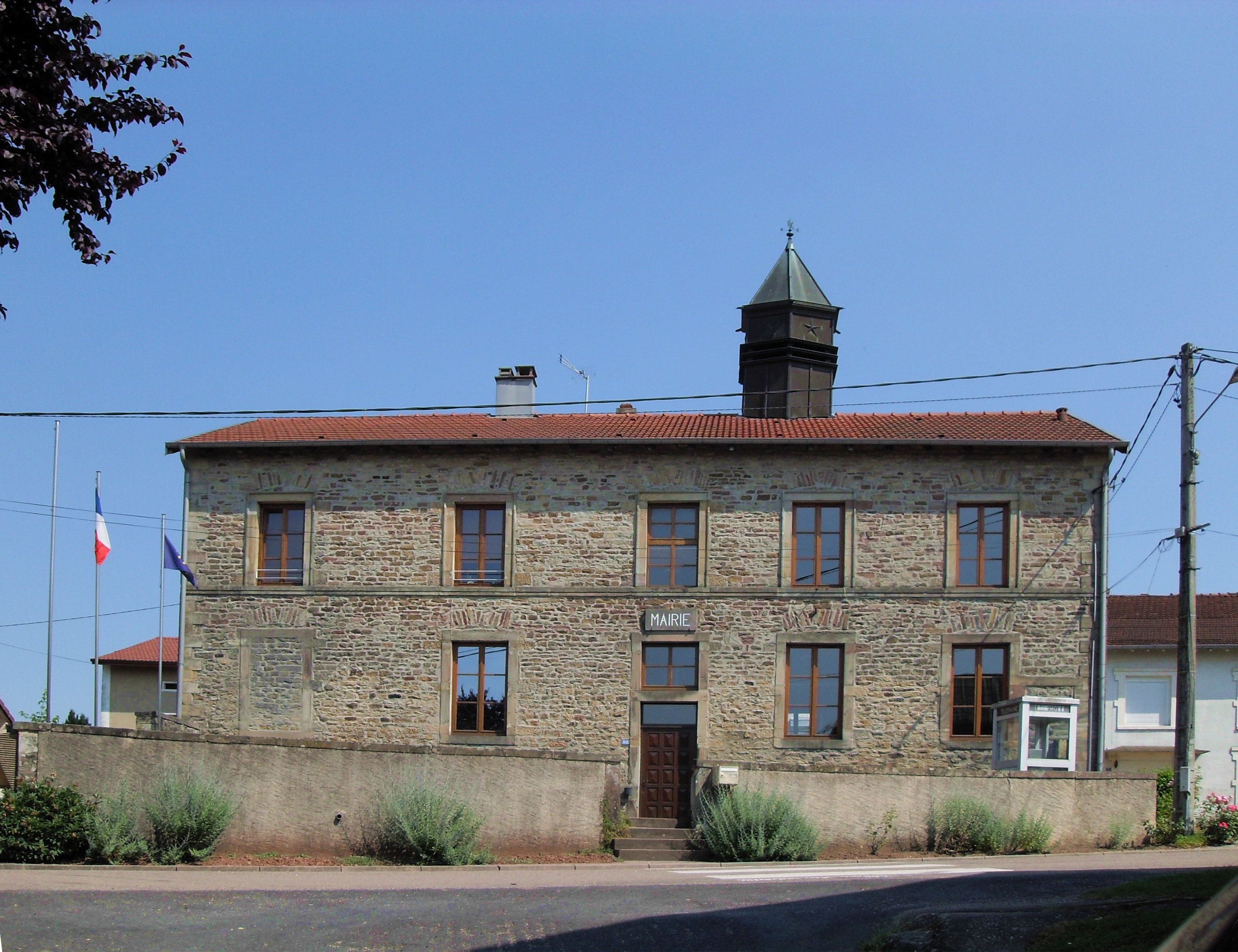 La mairie d'Anglemont